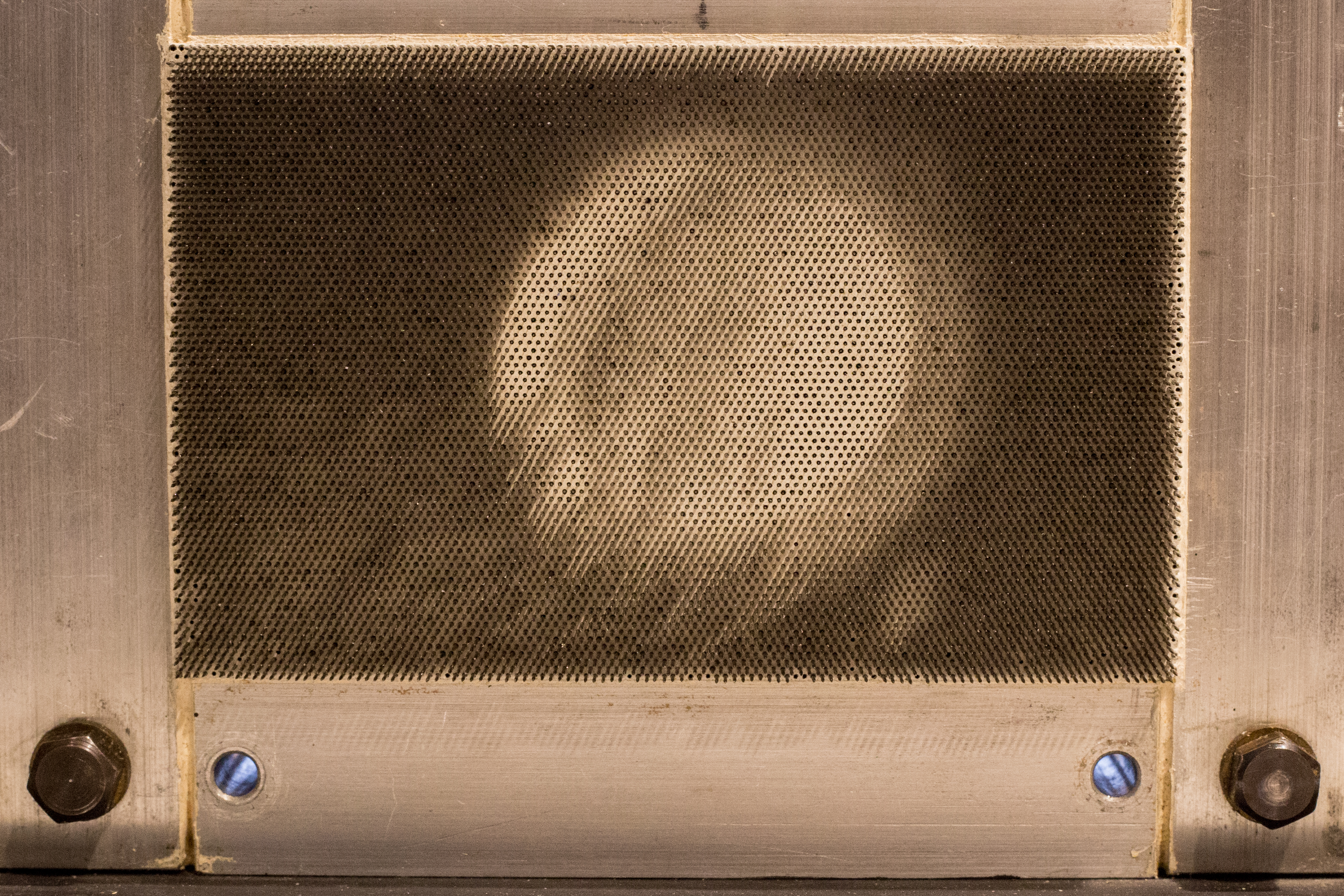 Détail d'un écran d'épingles Baby Screen. Photo prise à la Médiathèque Guy-L.-Coté de la Cinémathèque québécoise.